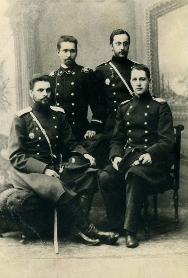 Шенк Владимир Константинович, Шенк Алексей Константинович, Карпов А., Третесский Николай Иустинович около 1898